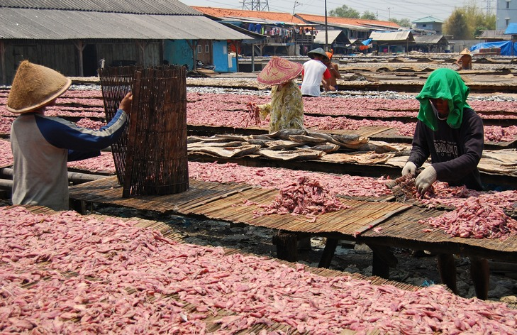 Fish sun-drying, Muara Angke, Jakarta, Indonesia